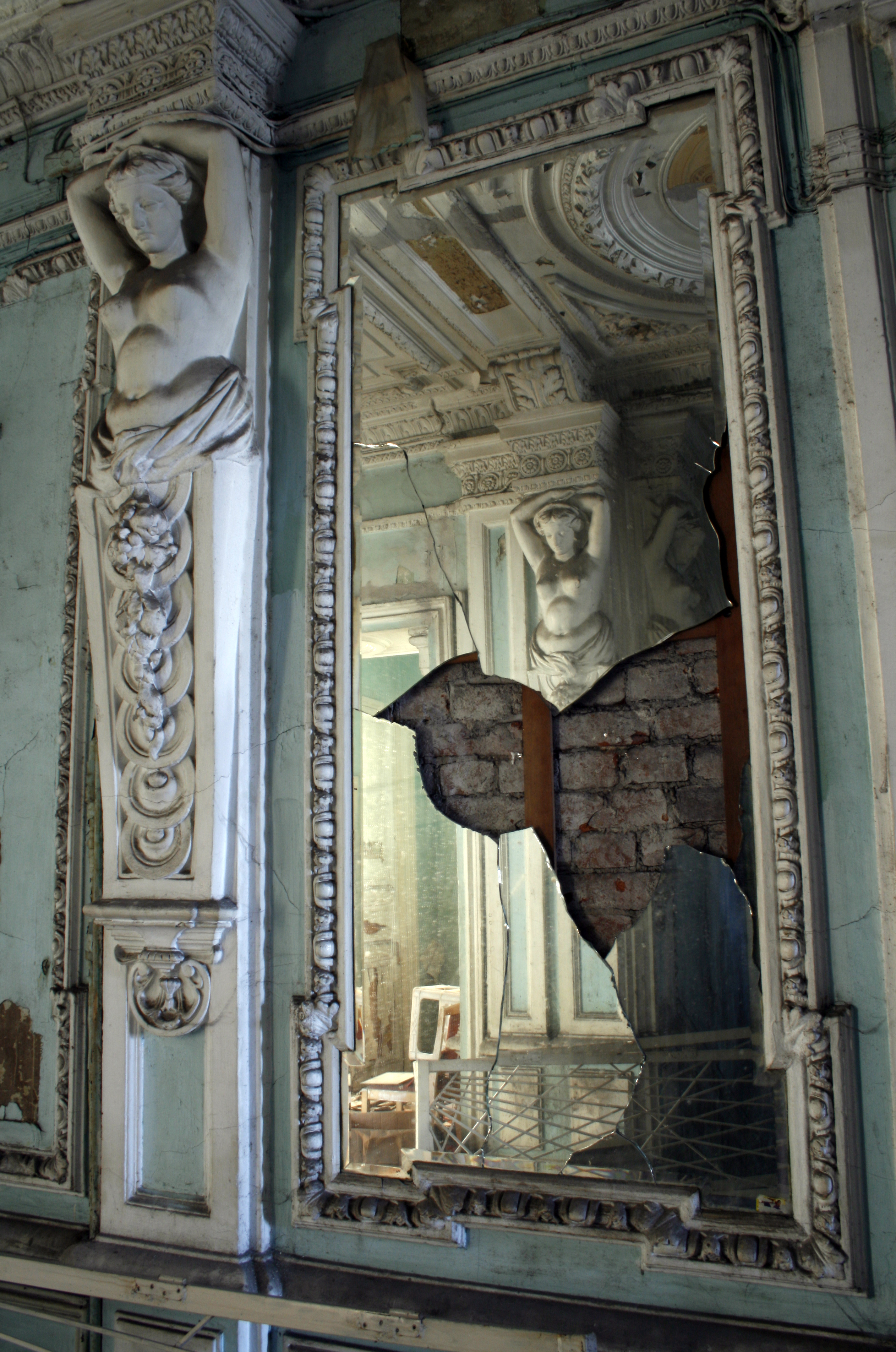 Особняк Г.И. Веге: Октябрьская набережная, 38, Невский район, Санкт-Петербург Интерьеры особняка.